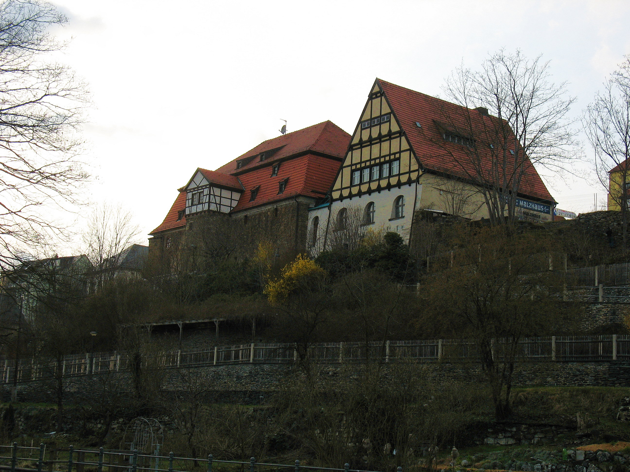 Das Malzhaus (ehem. Everstein'sches Schloss) in Plauen von der Bleichstraße aus gesehen